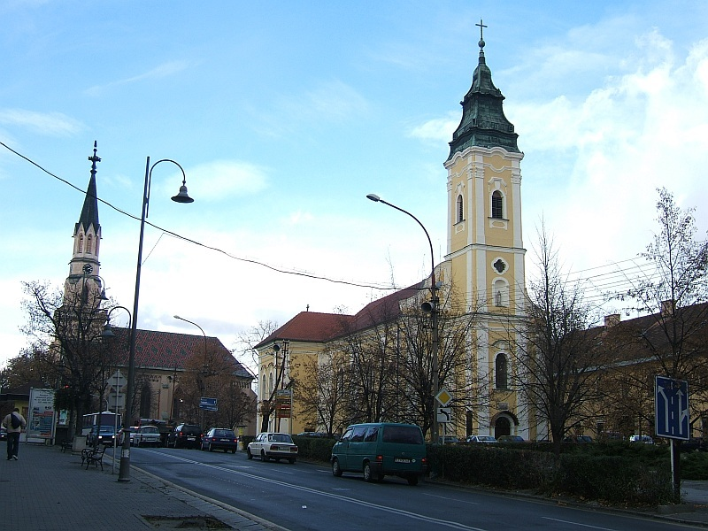 Lucenec_katolícky a kalvínsky kostol